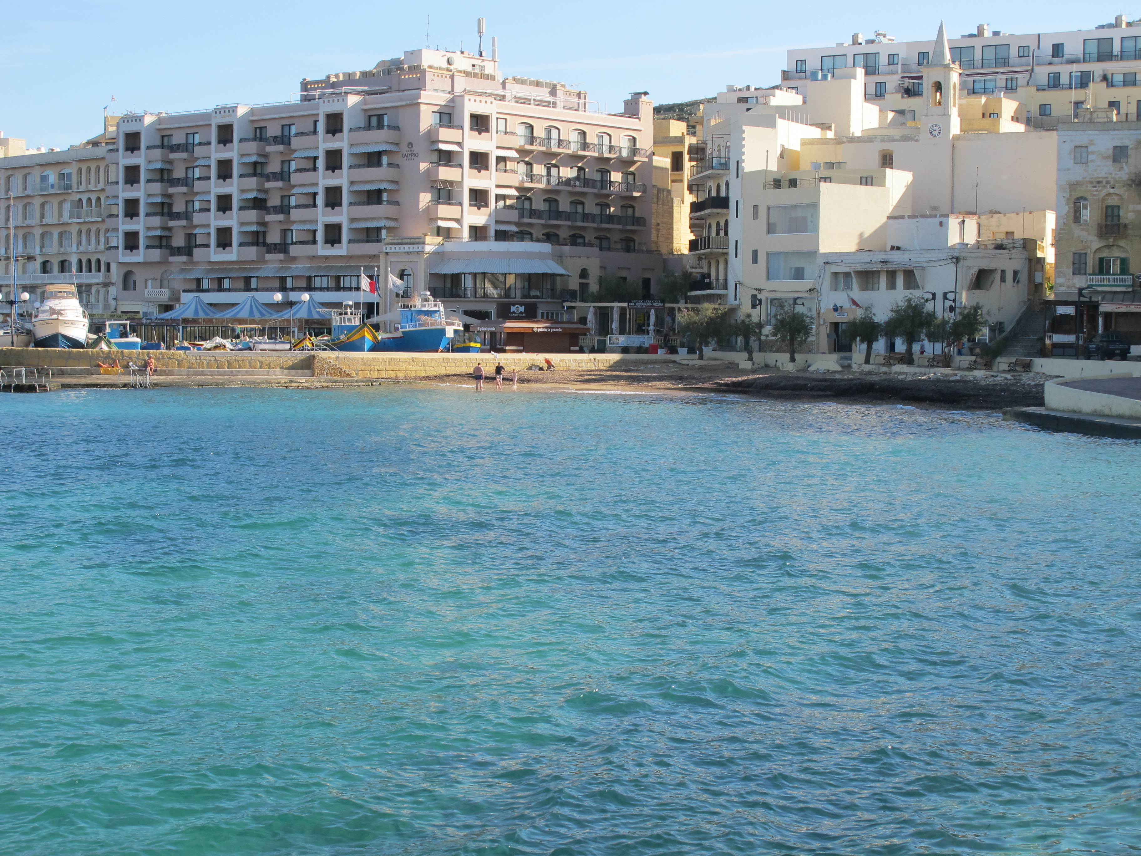 Uferpromenade in Marsalforn, Gozo